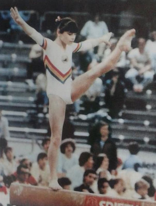 Gabriela Potorac, 1988 Olympics